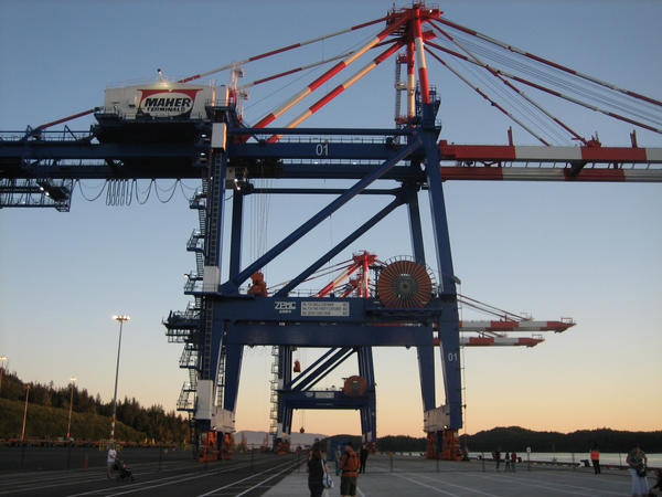 Prince Rupert container port cranes.